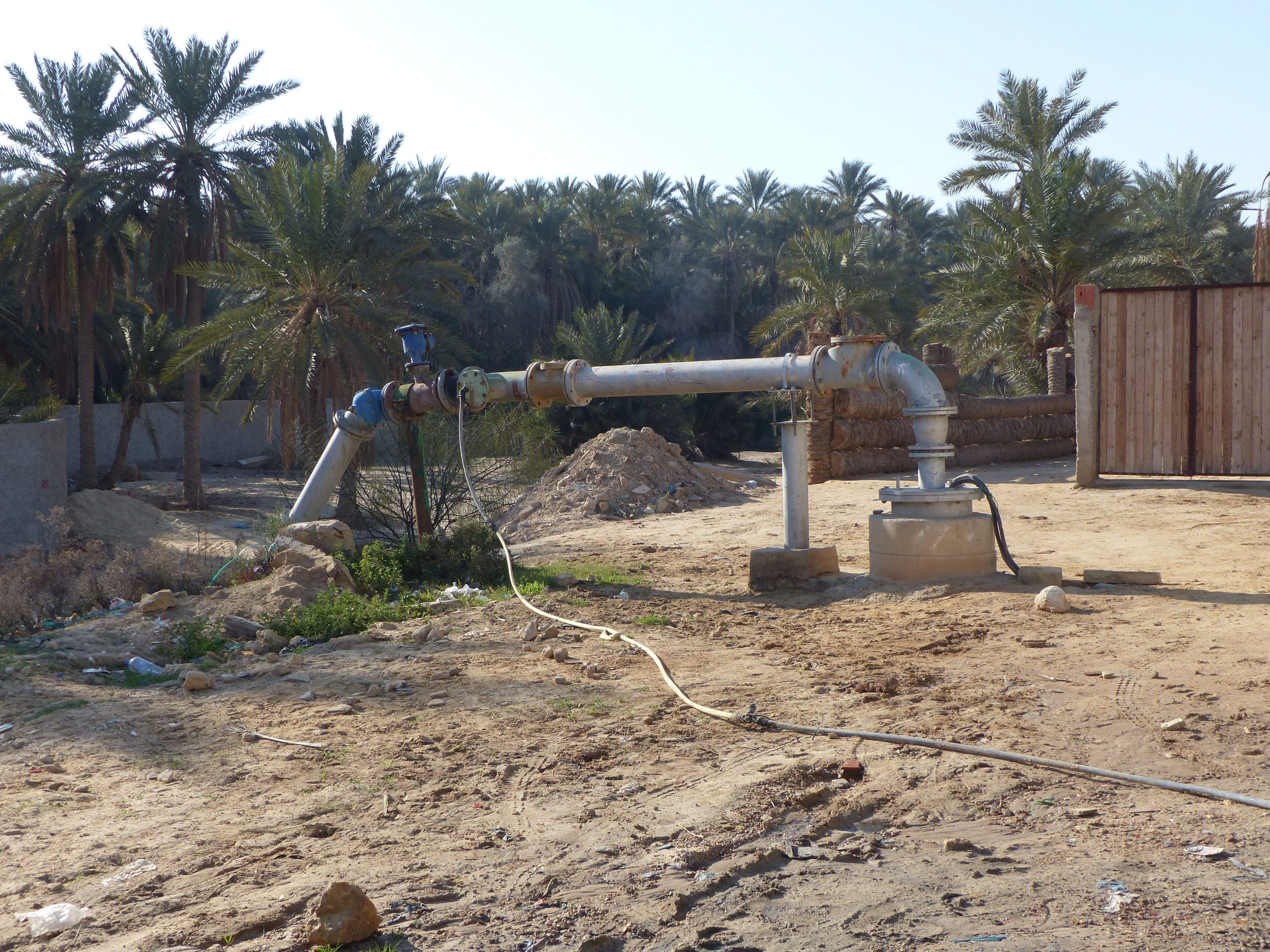 Forage d'eau de fabrication italienne à Tozeur, Tunisie